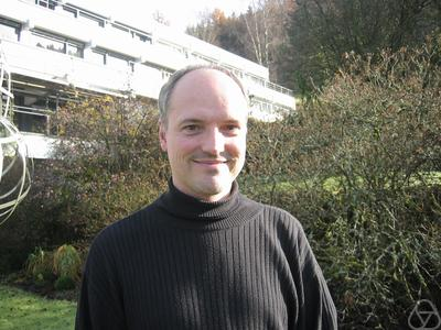 Foto di Christian Bär